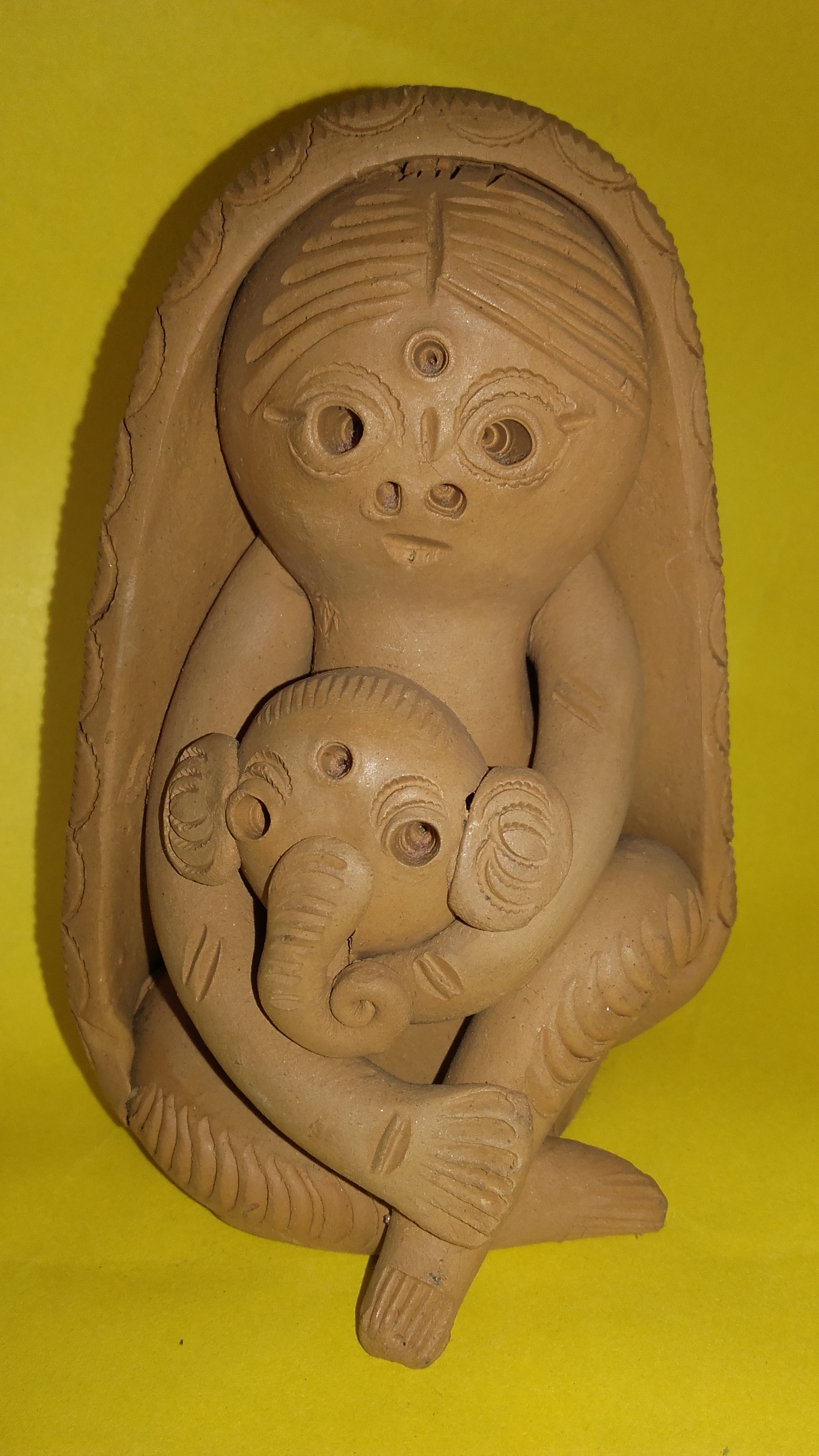 পশ্চিমবঙ্গের ষষ্ঠী পুতুল